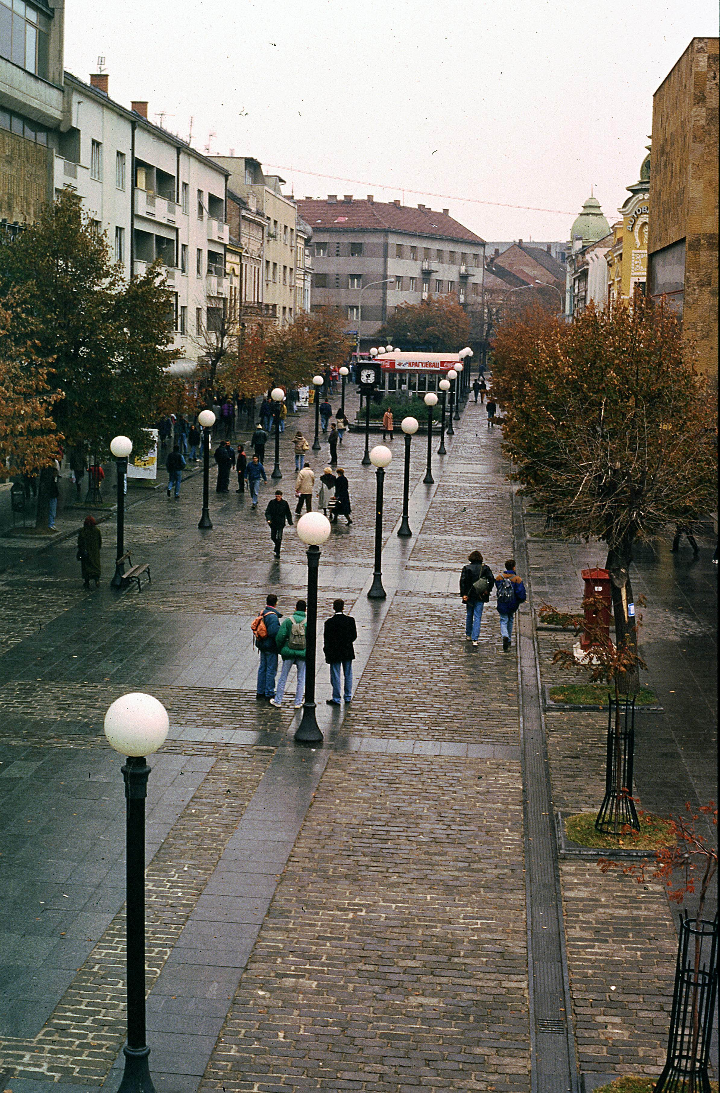 Pedestrian zone in Kragujevac, Serbia/Secteur piétonnier à Kragujevac, Serbie